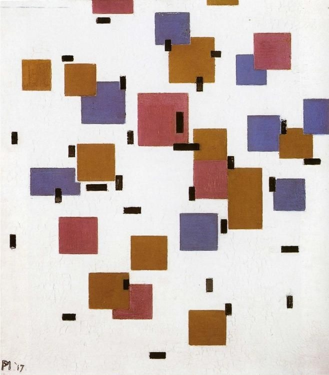 Kompozicija u boji A